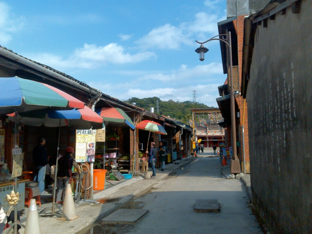 桃園縣三坑老街